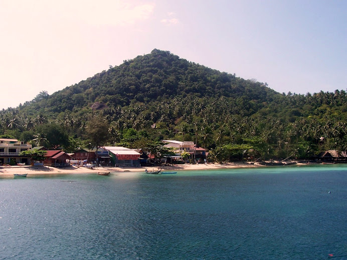 Ko Tao Adasi.